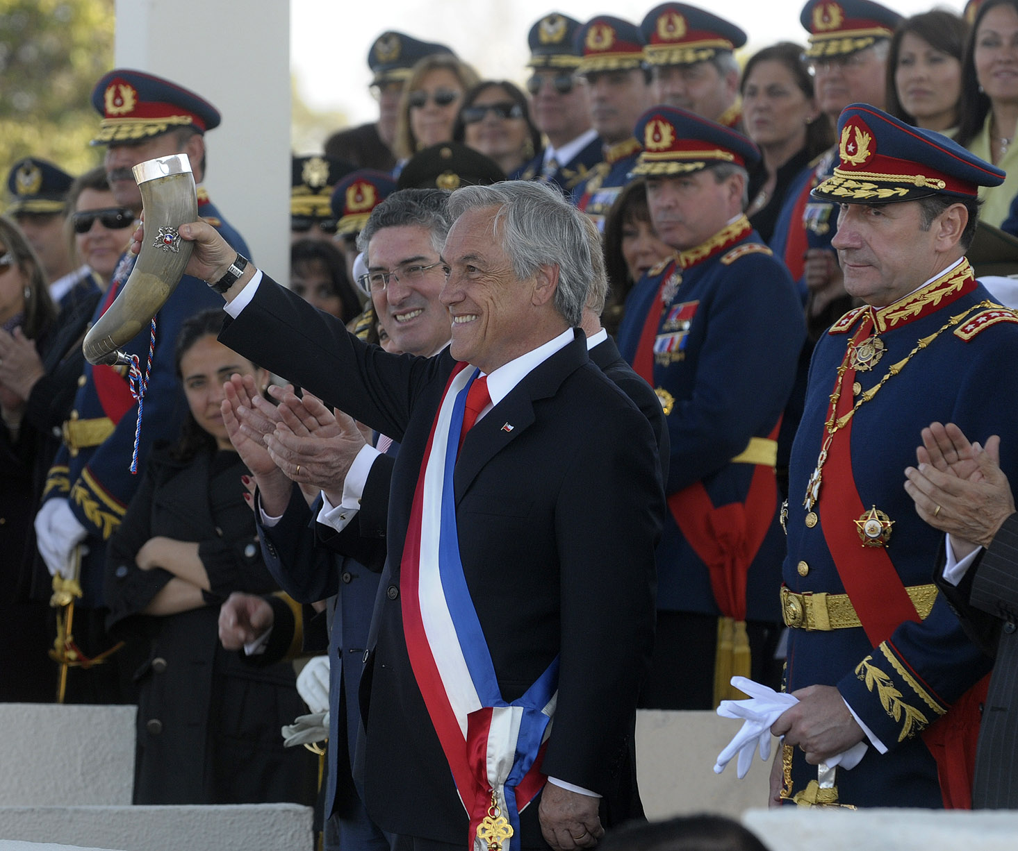 La Elipse del Parque O’Higgins fue el escenario para la Gran Parada Militar del Bicentenario, que contó con el desfile de 7.545 efectivos pertenecientes a las distintas ramas de las Fuerzas Armadas y de Orden. Asimismo, participaron en esta actividad delegaciones militares de Estados Unidos, México, Paraguay, Uruguay Argentina, Bolivia, Brasil y Colombia. El Presidente de la República, Sebastián Piñera, rindió homenaje a las Fuerzas Armadas de nuestro país. “Hoy, en que celebramos las Glorias de nuestro Ejército, quiero recordarles a todos mis compatriotas que este Ejército profesional, no deliberante, jerarquizado y disciplinado, está y va a estar siempre a la altura de los desafíos y de los requerimientos de este siglo XXI y de esta nueva etapa que inicia hoy día nuestra patria”, afirmó.